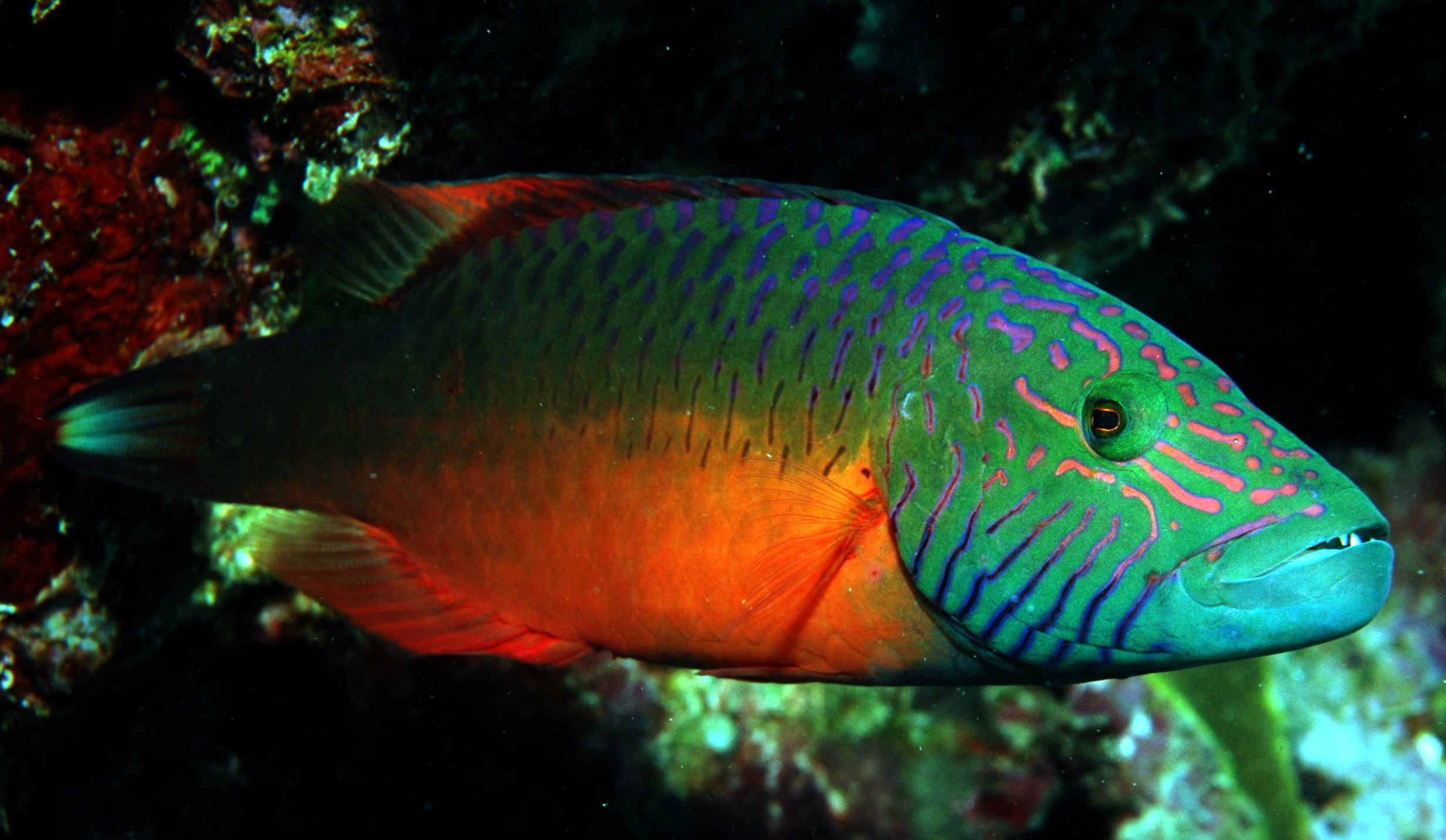 Oxycheilinus digrammaGreat Barrier Reef, Cairns, Australia